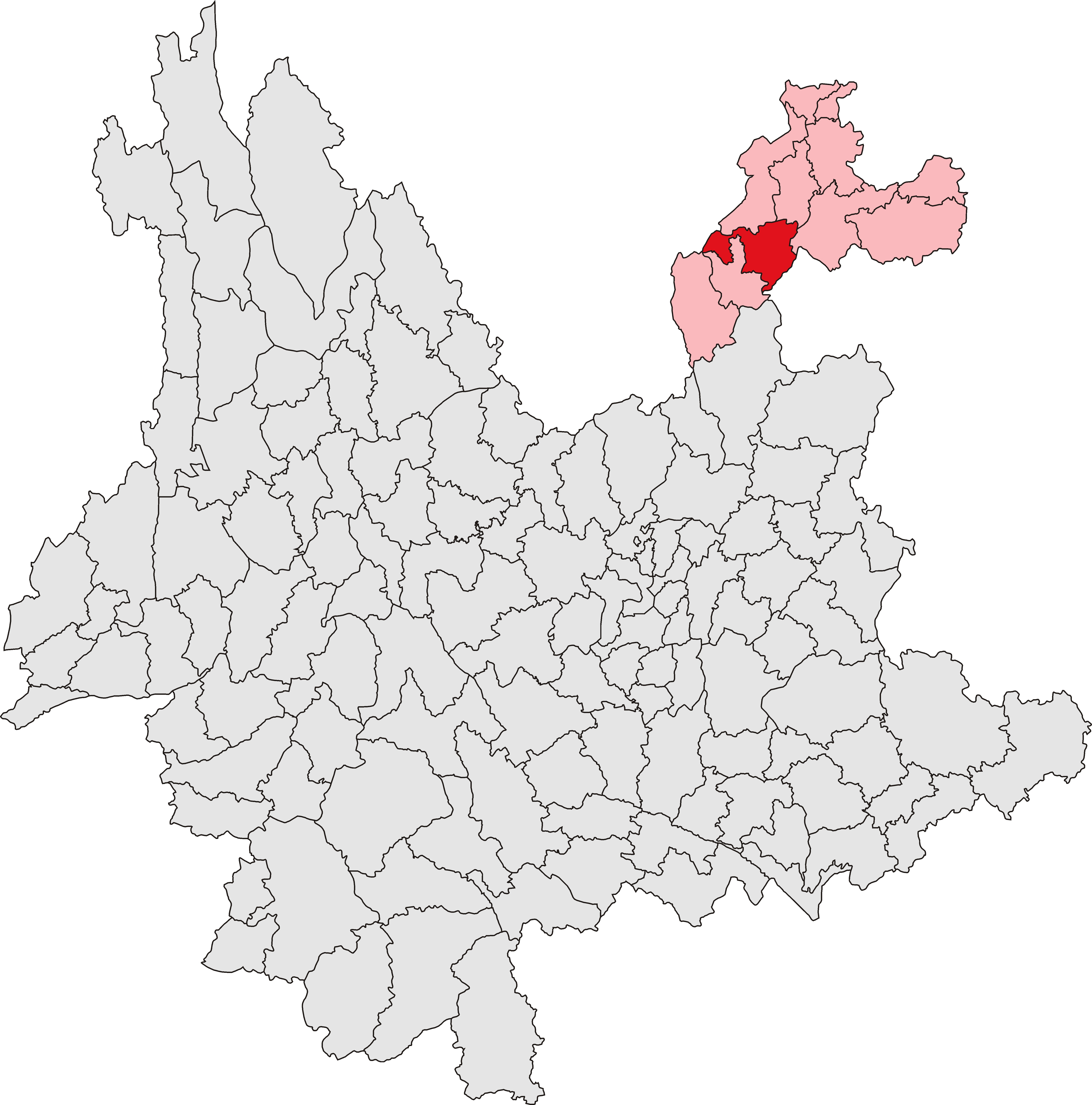 中文（中国大陆）: 昭阳区位置图